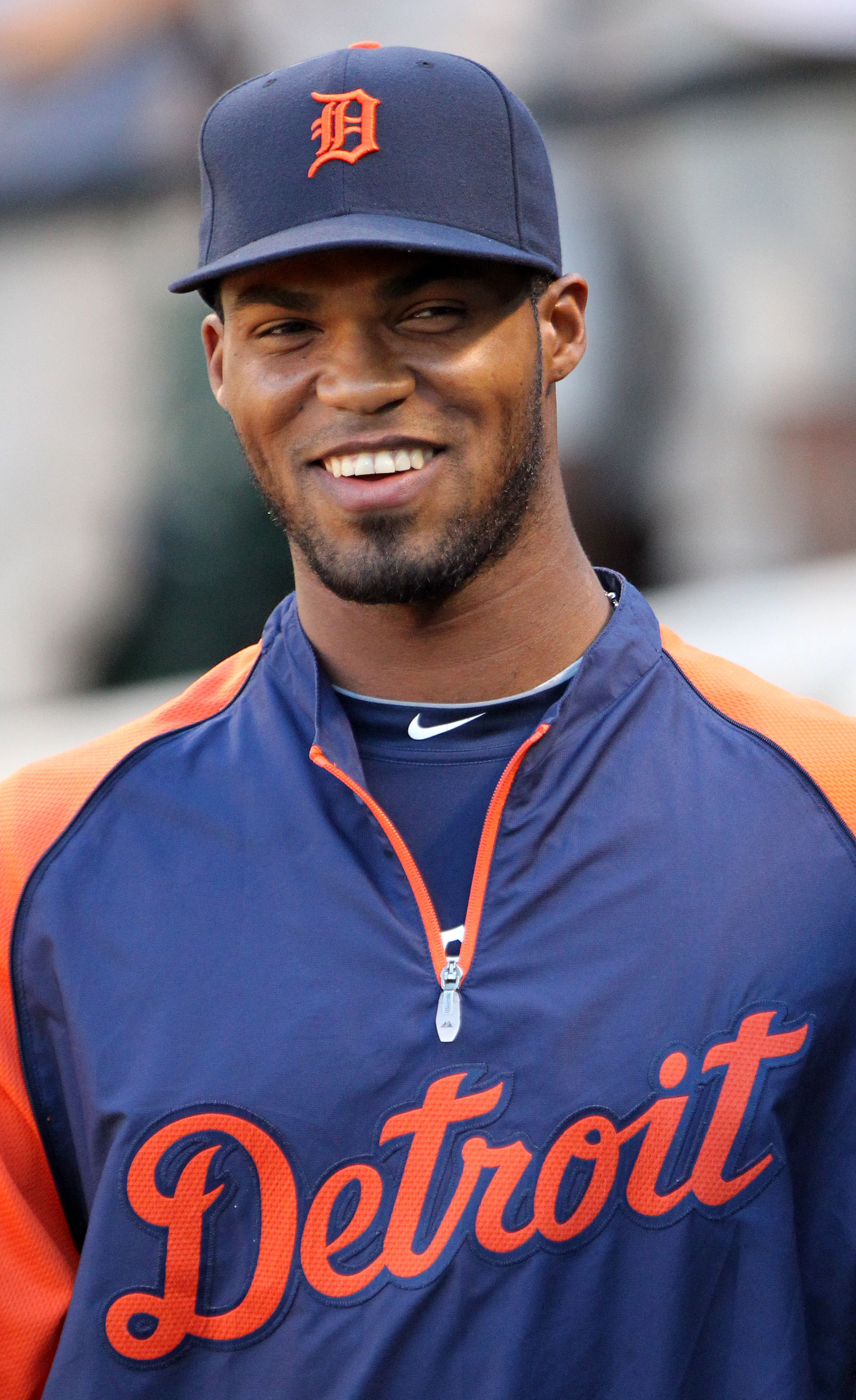 Al Alburquerque